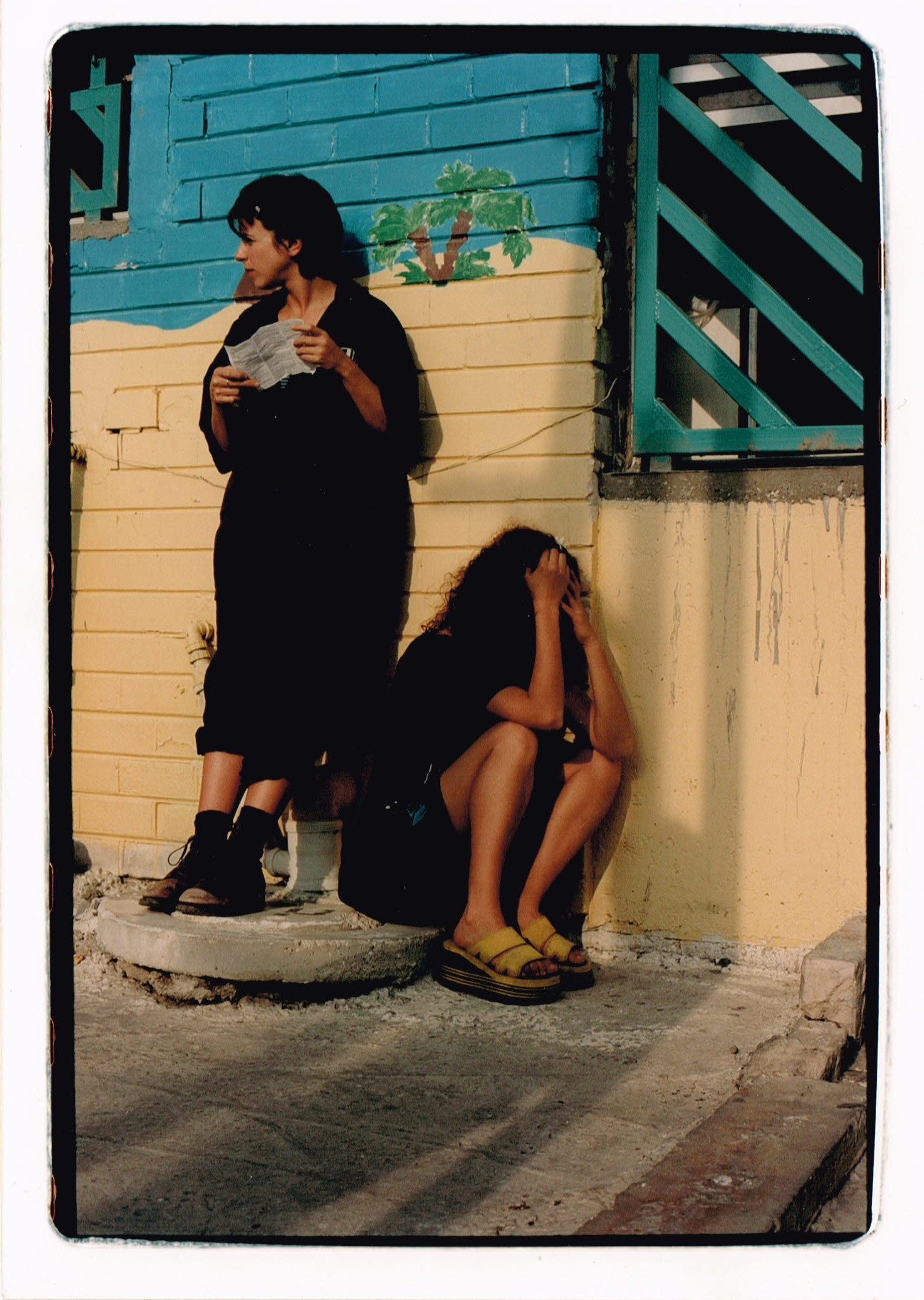 לירית מאש בתפקיד לונה בסדרת הטלוויזיה זינזאנה